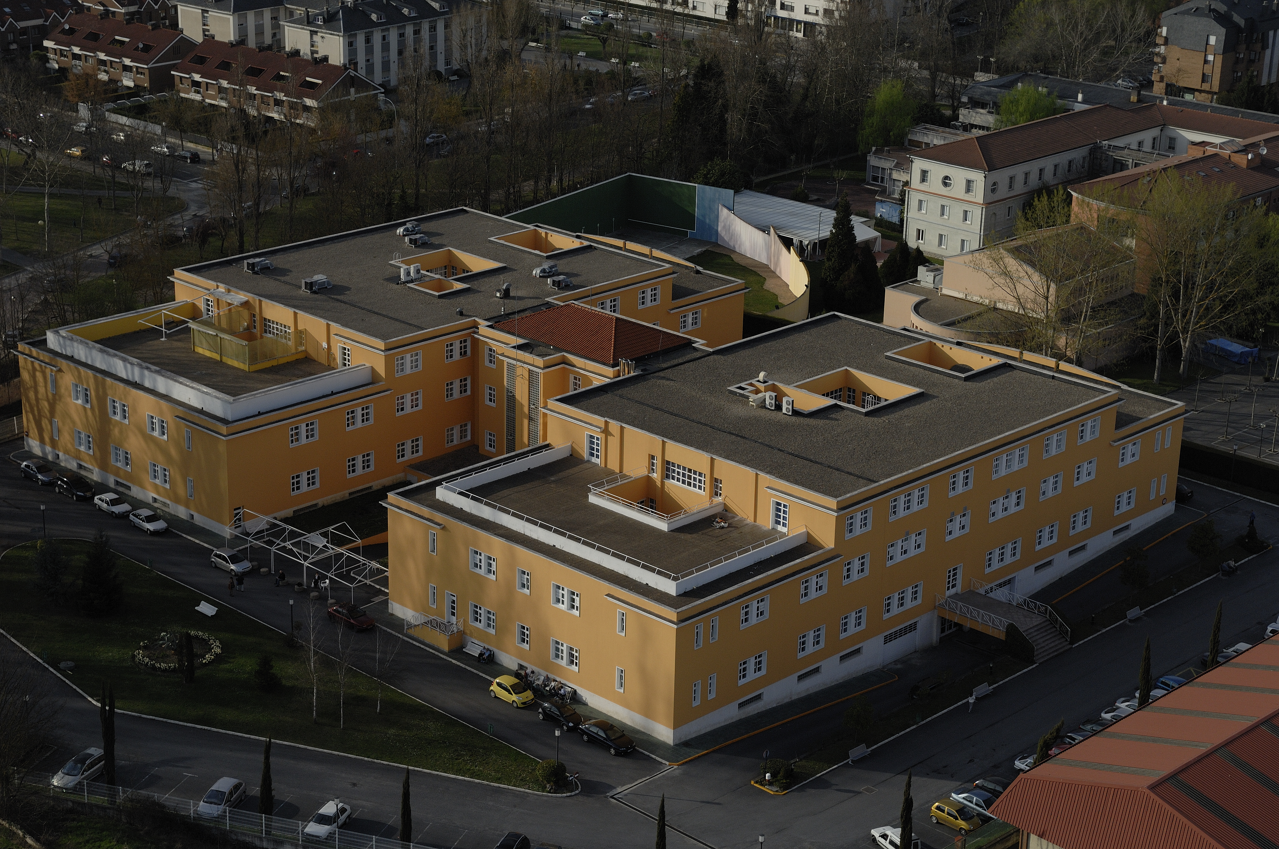 Hospital Psiquiatrico de Araba Las Nieves